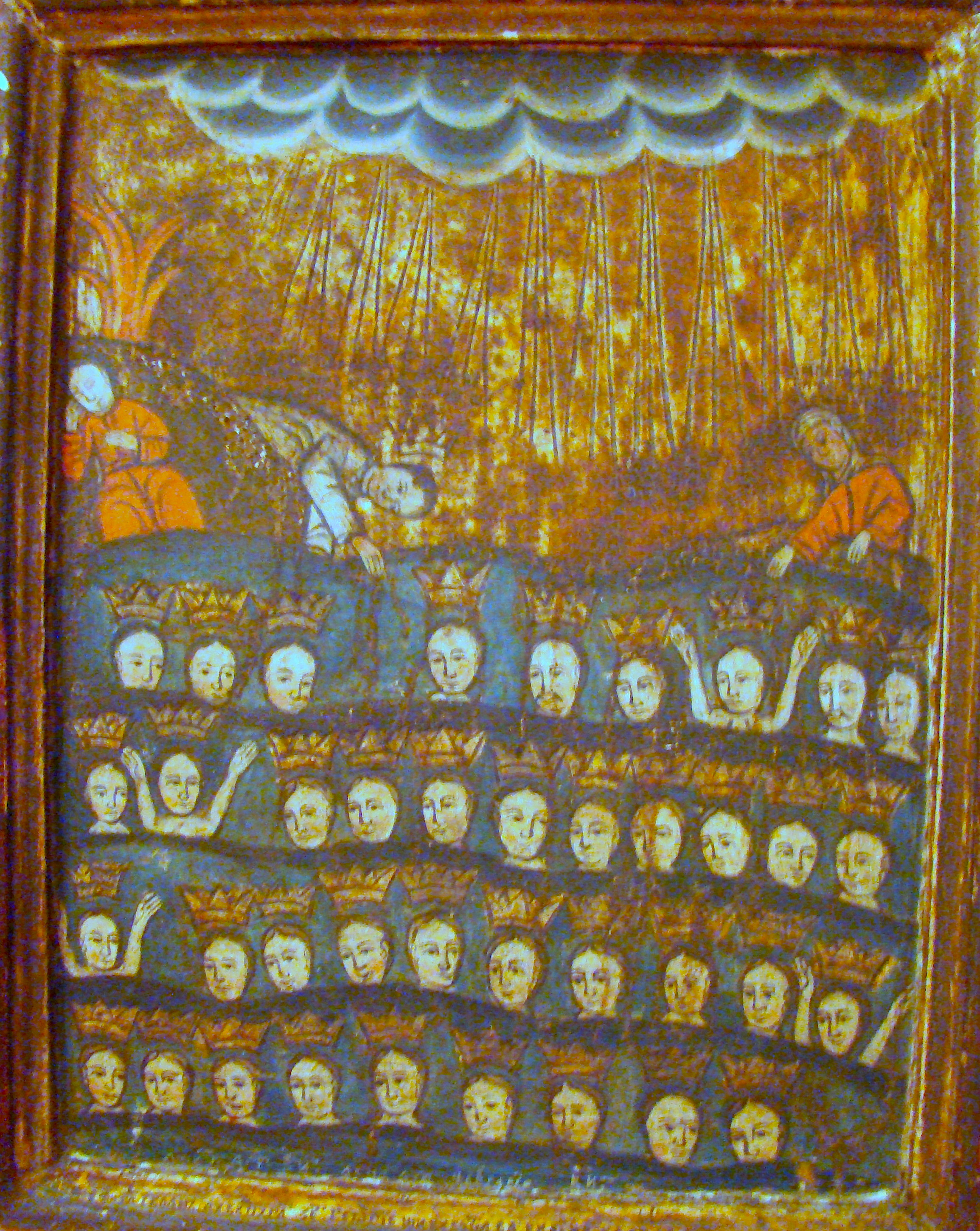 Muzeul grăniceresc năsăudean